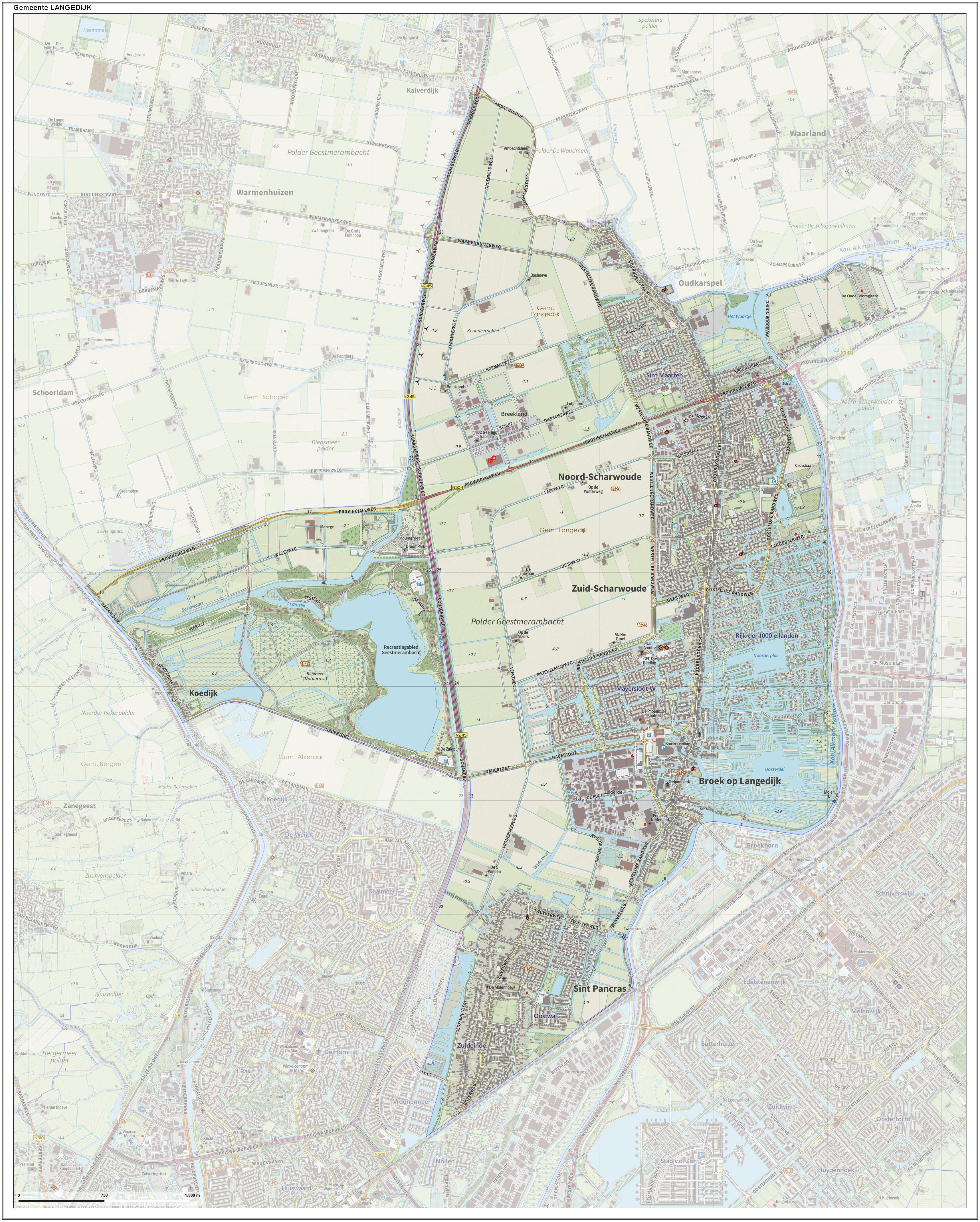 Topografische gemeentekaart. Resolutie: 400 pixels/km. Kaartbeeld samengesteld uit de open geodata van de Top10NL en Top25namen (Kadaster), Creative Commons-BY licentie. Gebouwvlakken uit open geodata BAG extract. Wegen uit de OpenStreetMap, OpenStreetMap community. Reliëfschaduw uit de Actuele Hoogtekaart AHN2. Samenstelling en kleurenschema: Jan-Willem van Aalst, met QGIS. Zie ook de Legenda.